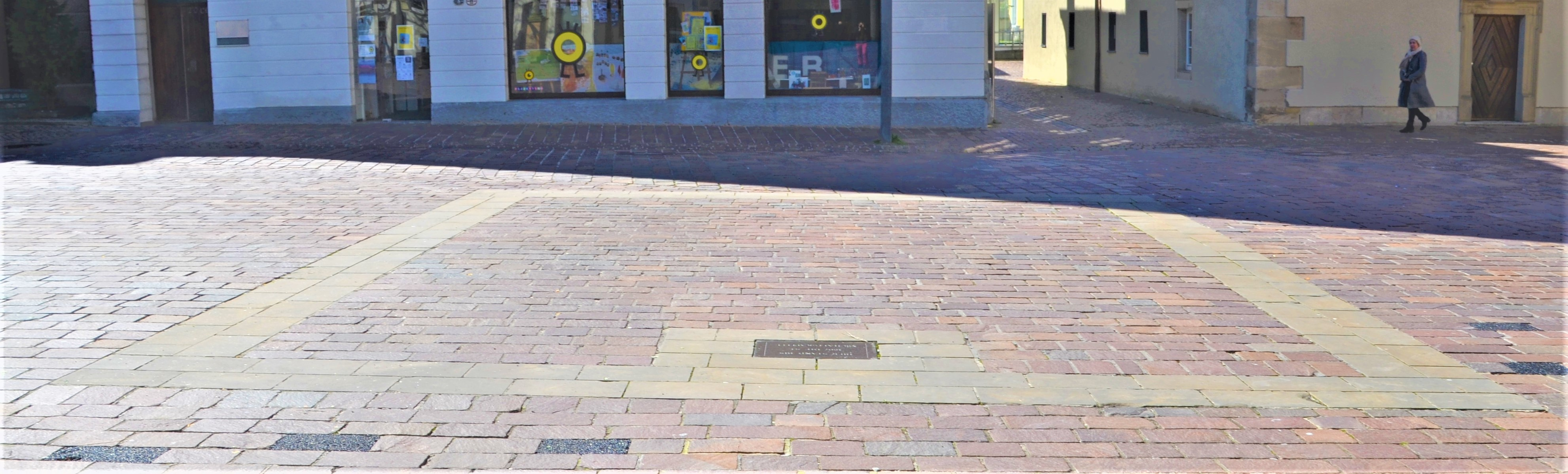 Umriss der Michaelskapelle auf dem Boden des Münsterplatzes in Schwäbisch Gmünd